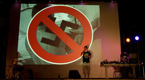 Live Show, Die Bandbreite (Band)